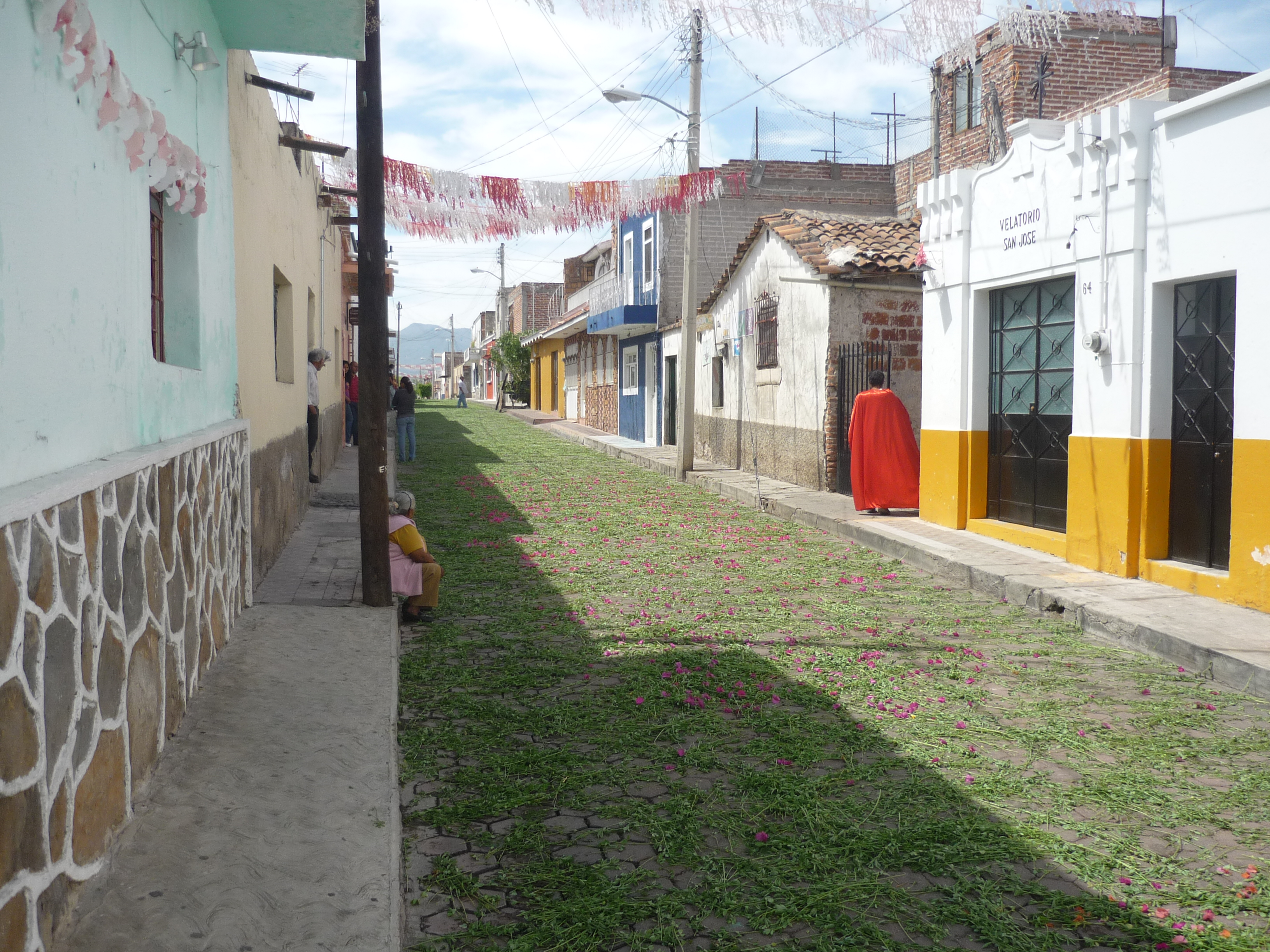 Calle de Estipac en Viernes Santo